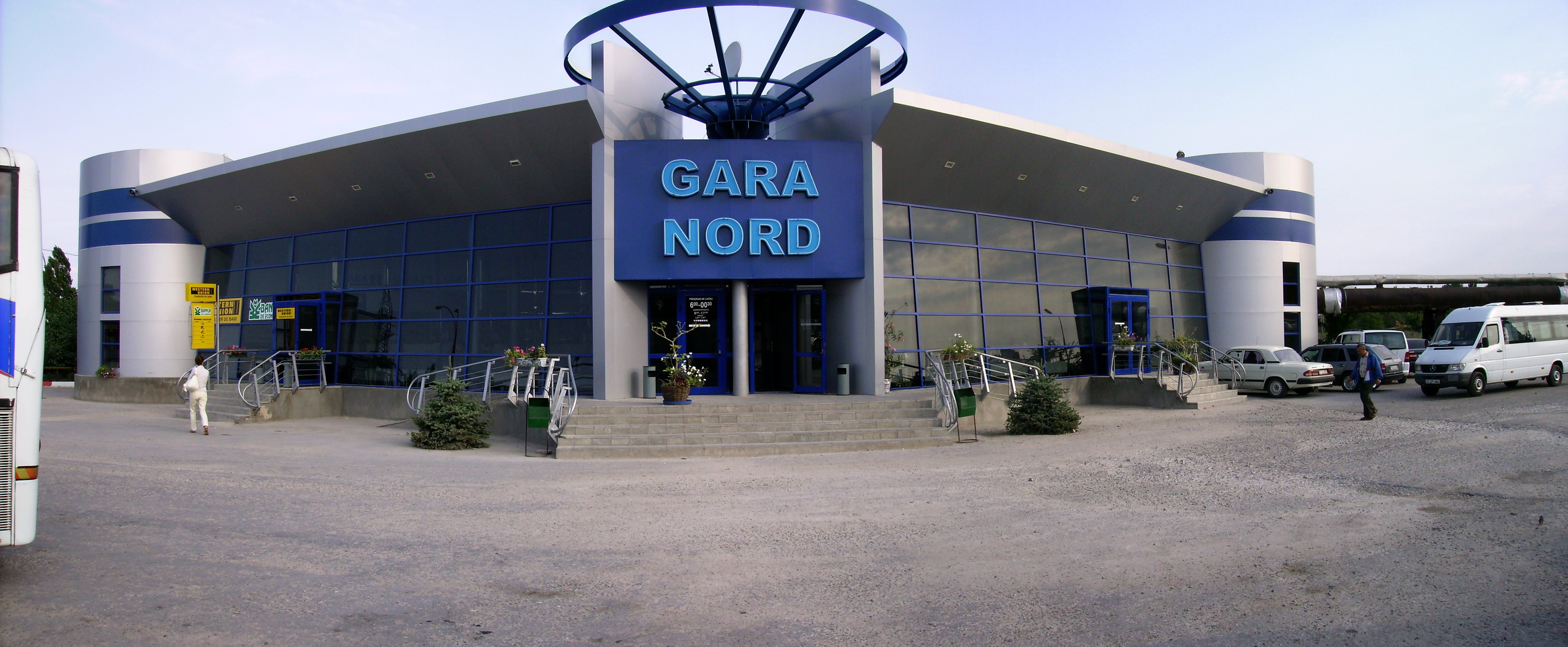 Северный автовокзал города Кишинёв в 2007 году.